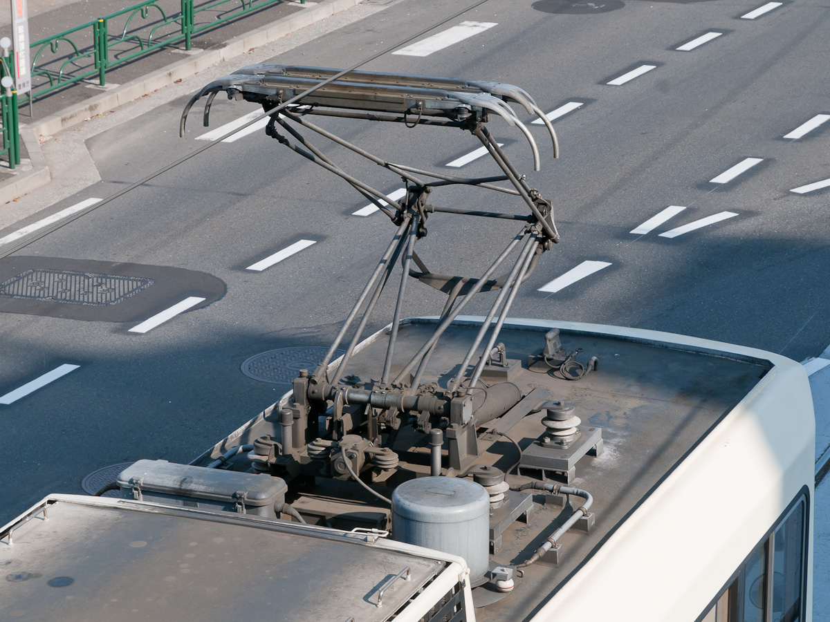 都電荒川線8500形の集電装置。